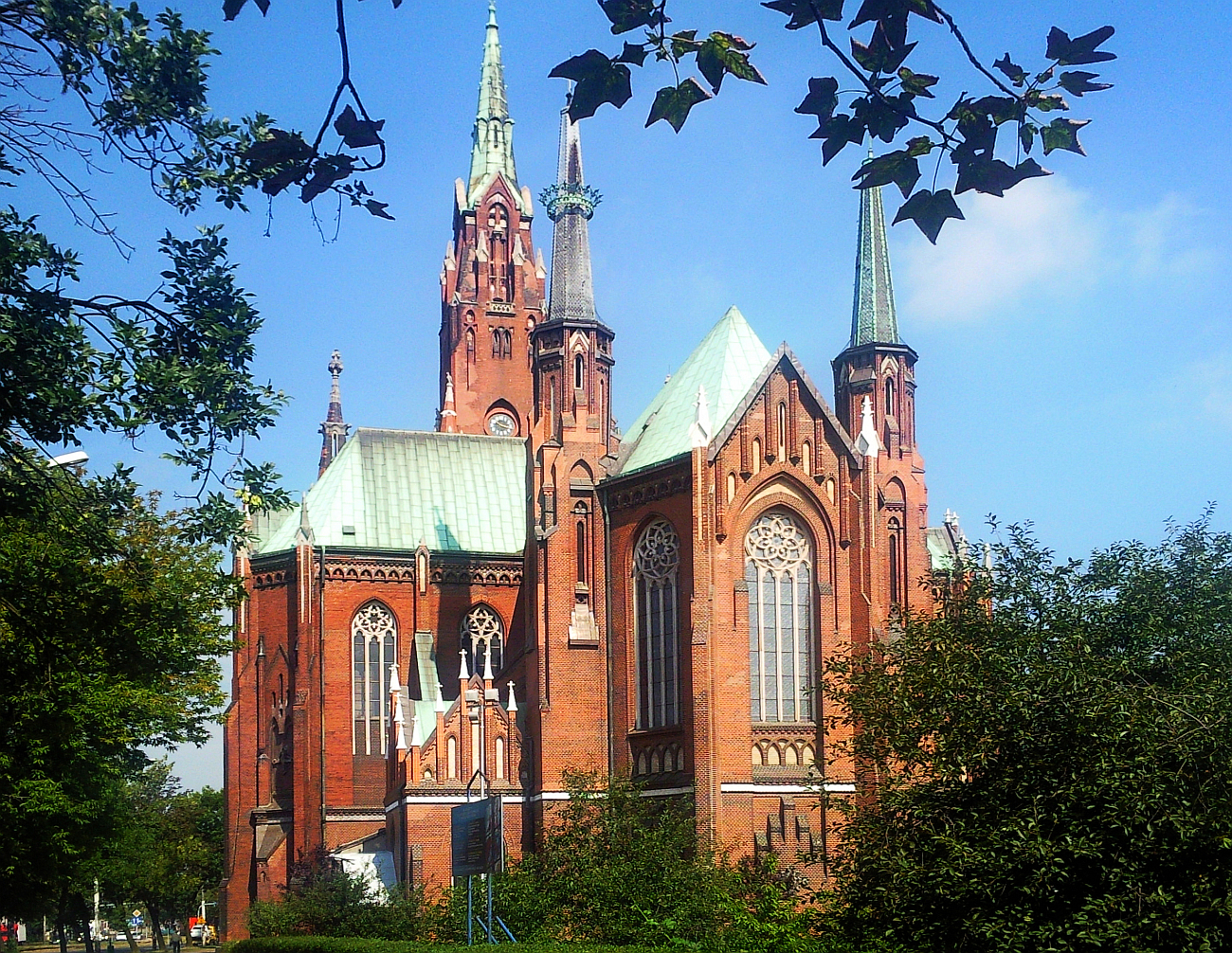 Dąbrowa Górnicza - Bazylika NMP Anielskiej